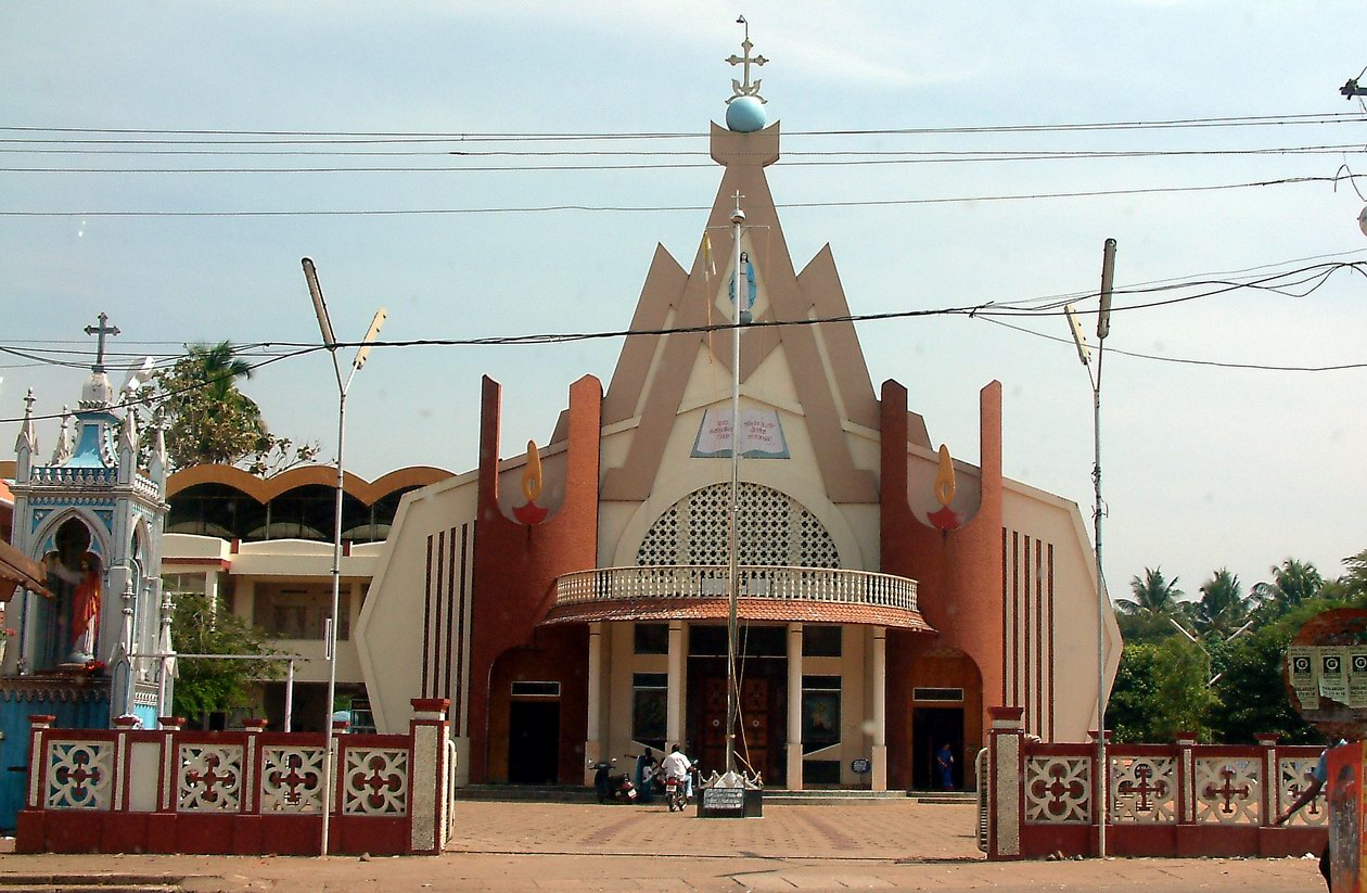 St mary's church